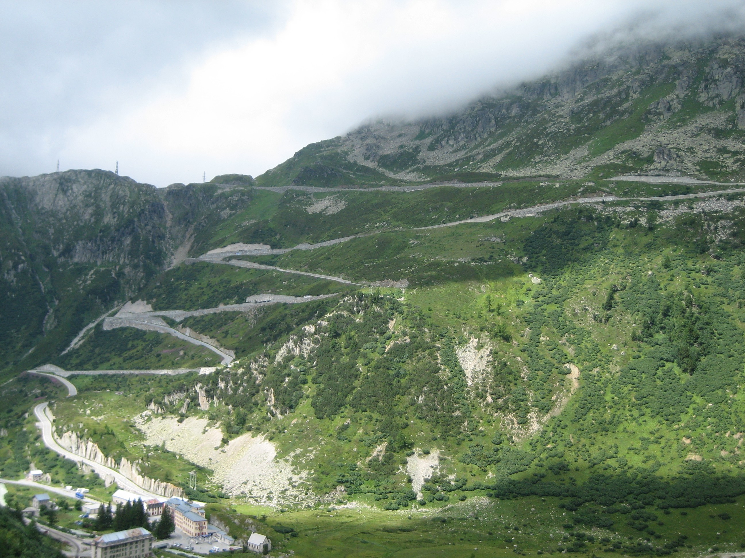 Grimselstrasse, links unten Gletsch